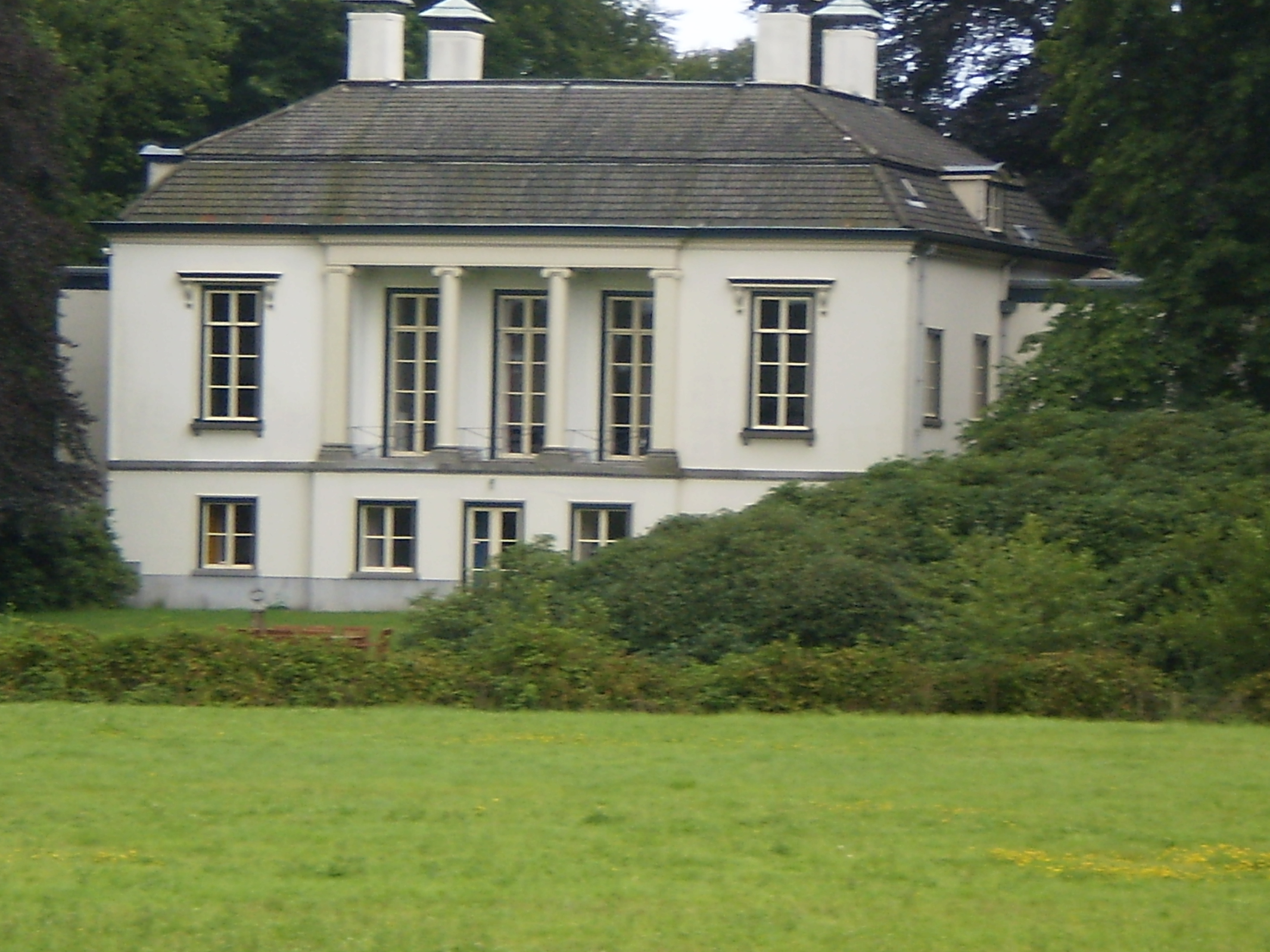 Ewijckshoeve.